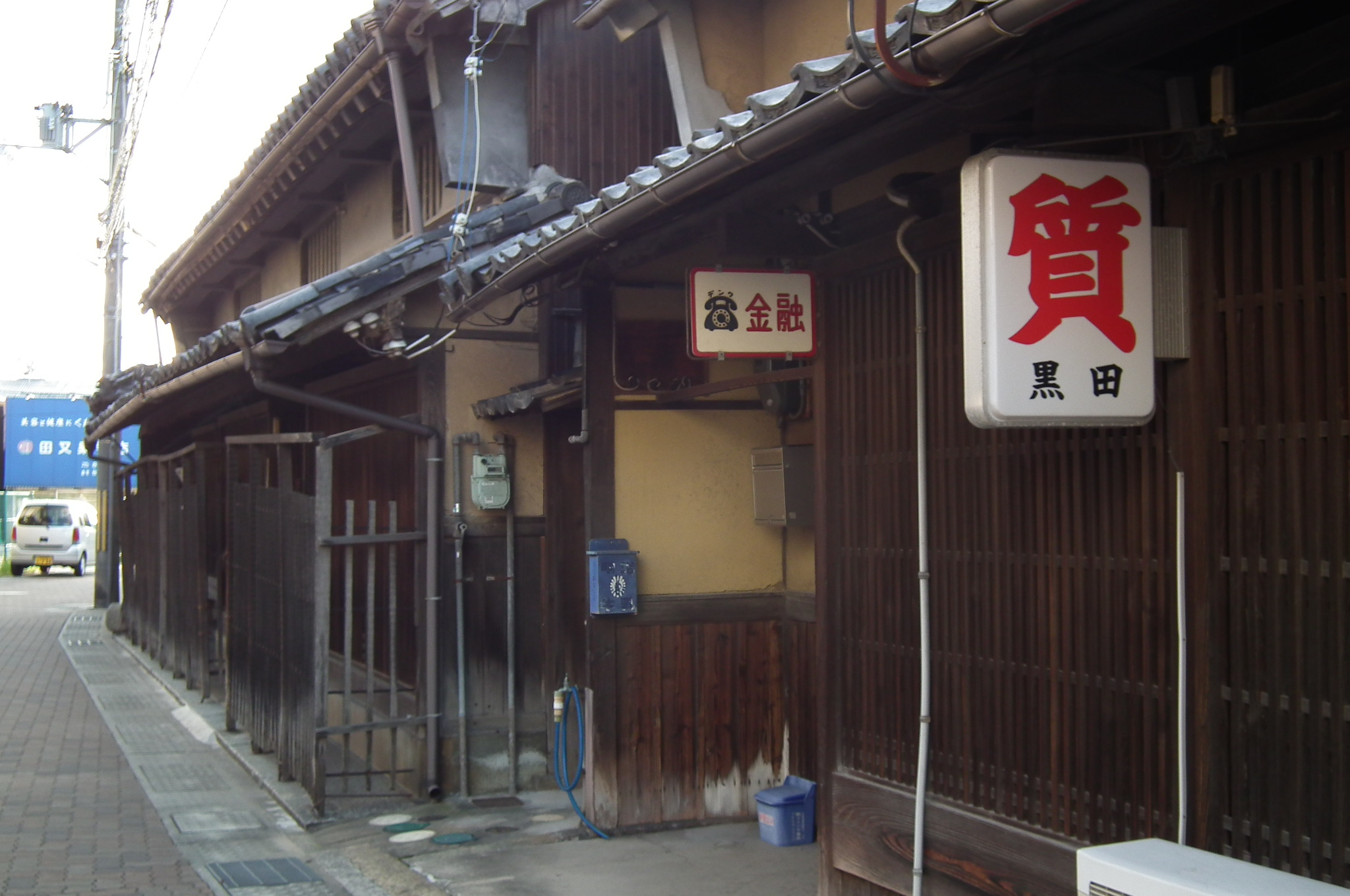 三木市本町二丁目 黒田質店 ひめじ道 Honmachi2-Miki